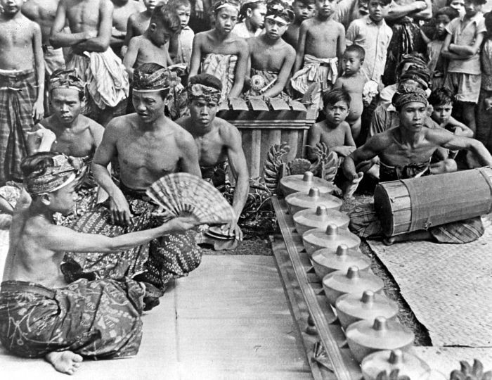 Repronegatief. Balinese kebyardans met begeleiding van een gamelanorkest